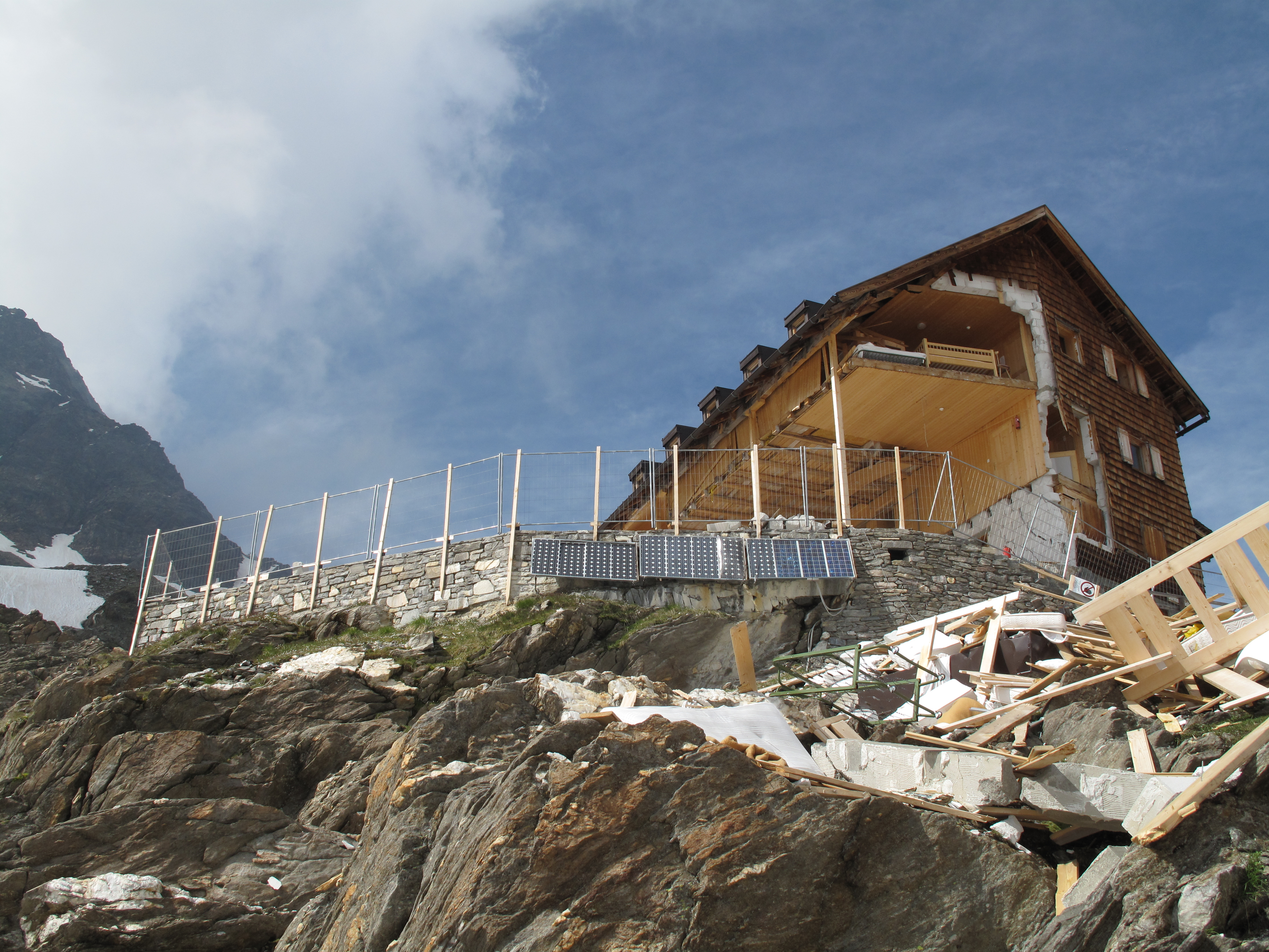 Stettiner Hütte 19. Juli 2014